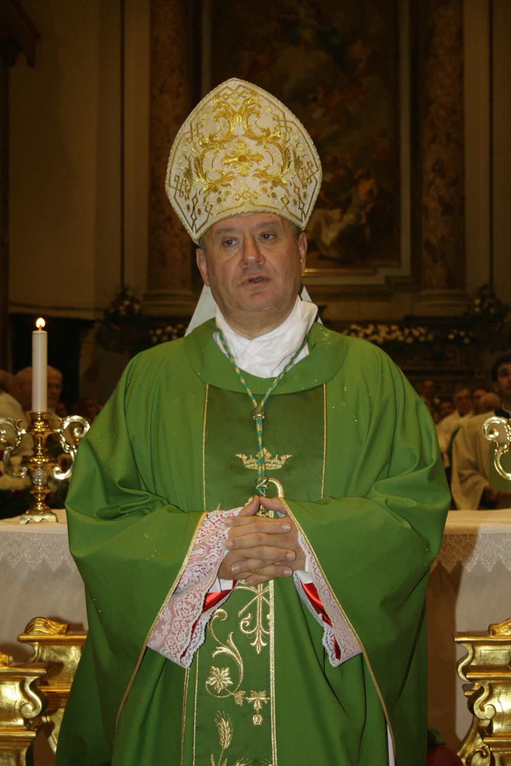 Antonio di Donna, vescovo di Acerra, durante l'insediamento presso la sua Diocesi